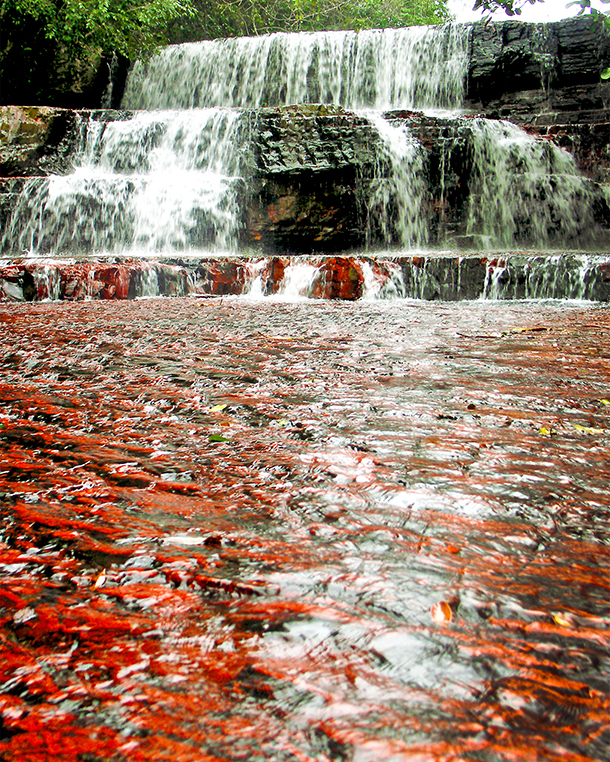 La fantástica superficie de roca lisa y roja de la Quebrada de Jaspe en el Parque Nacional Canaima, todo una atractiva joya que hipnotiza al nativo o turista, principalmente destaca el rojo por sobre las áreas negras y amarillas.